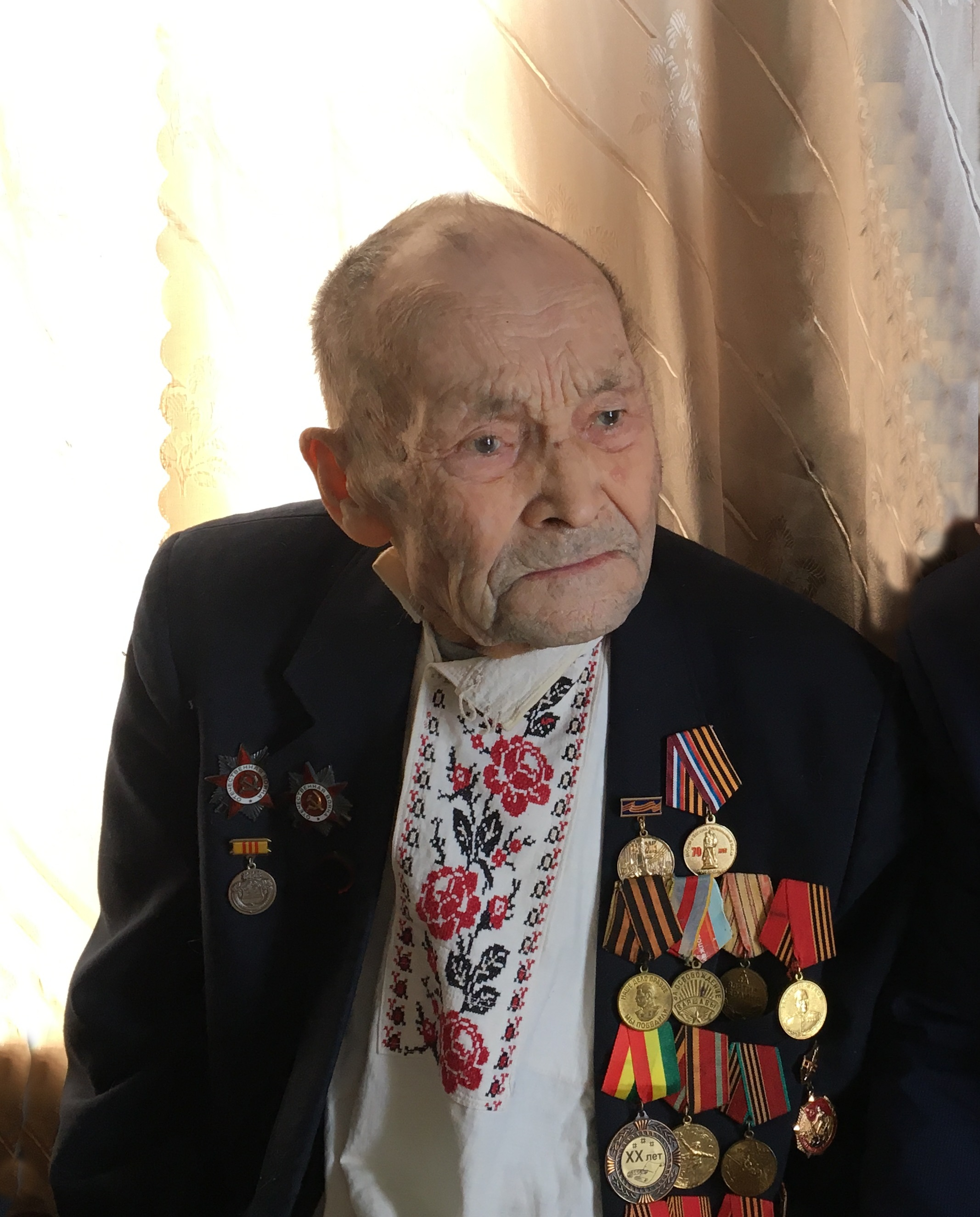 Портрет народного мастера, ветерана Великой Отечественной войны Т.П. Дверенина в день 100-летия со дня рождения.